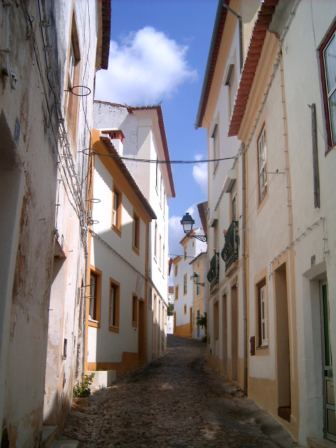 Rua típica de Abrantes, Portugal